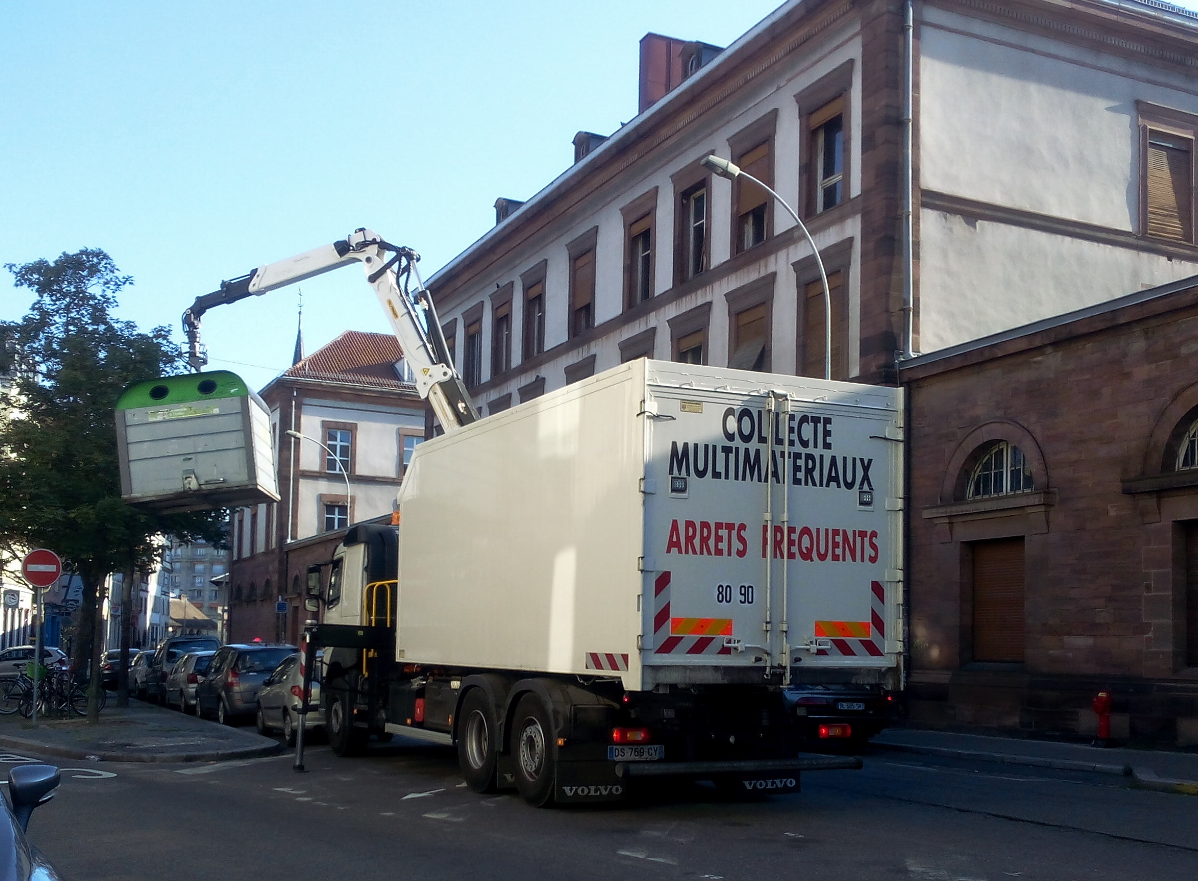 Collecte d'un conteneur à verre à Strasbourg, 2015